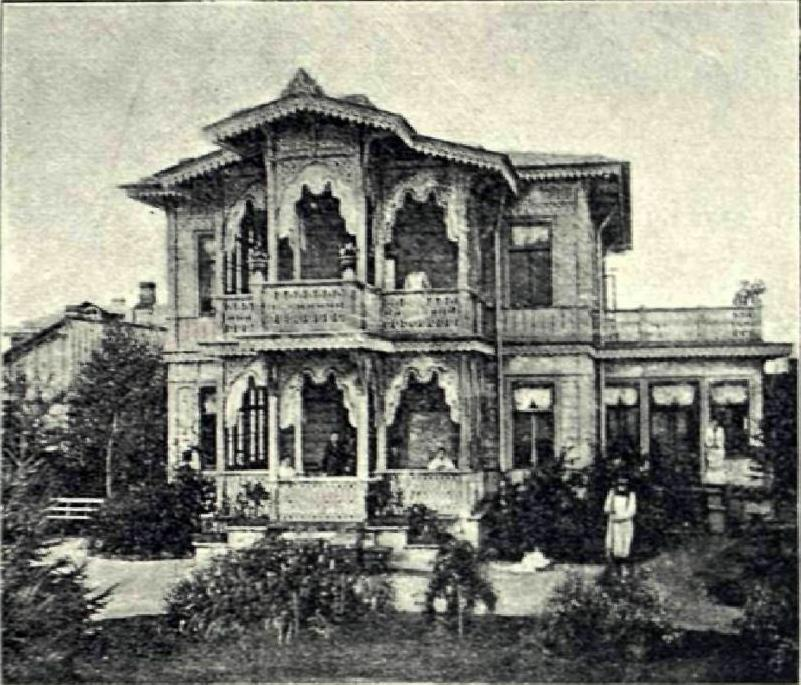 Канстанцін Іванавіч Ціхаміраў. Дача тайнага саветніка Уладзіміра Мікалаевіча Тукмачова ў Азярках